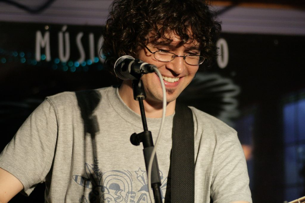 pacobelloconcierto